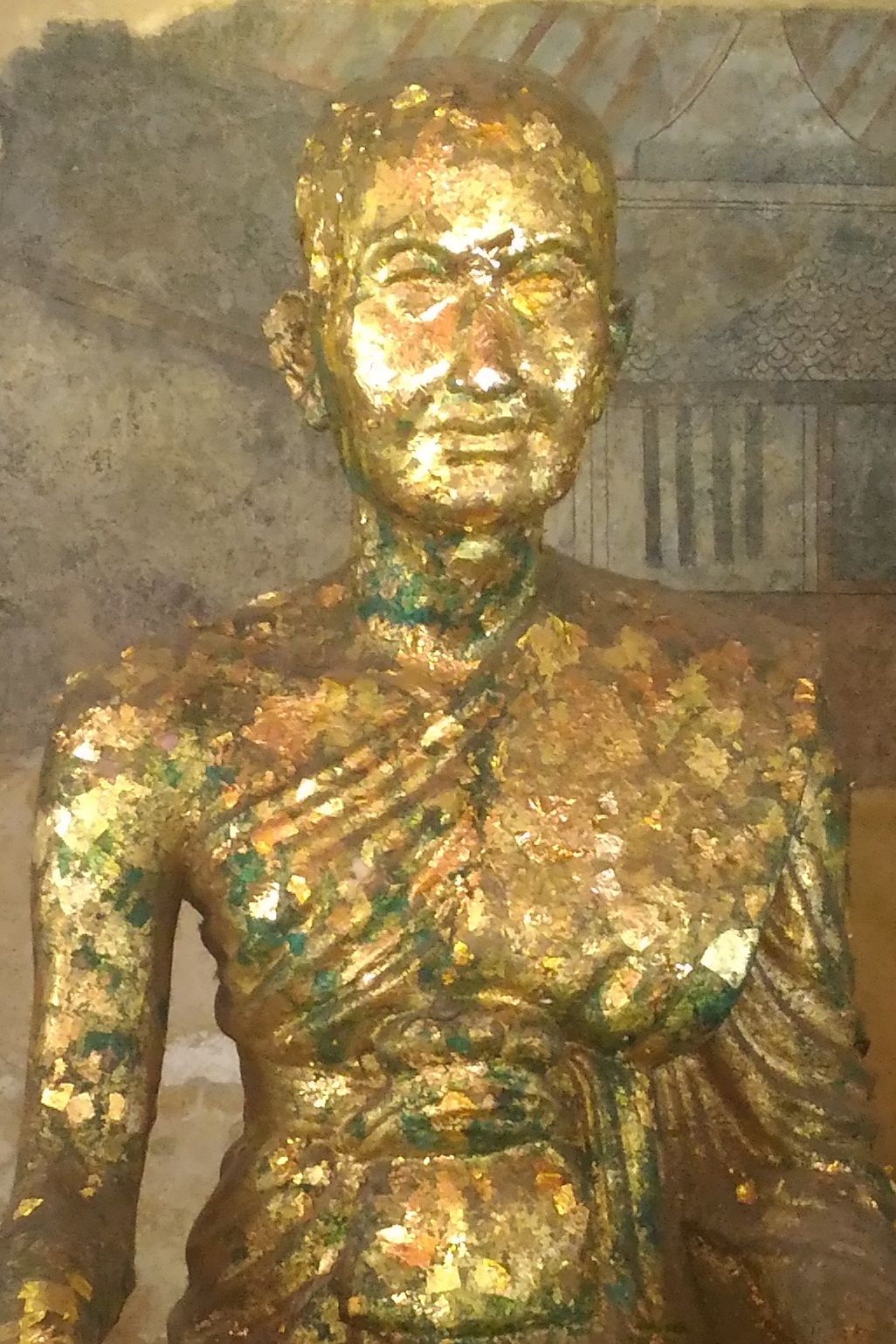 ประติมากรรมรูปสมเด็จพระสังฆราชเจ้า กรมพระปรมานุชิตชิโนรส สถิต ณ วัดพระเชตุพนวิมลมังคลาราม